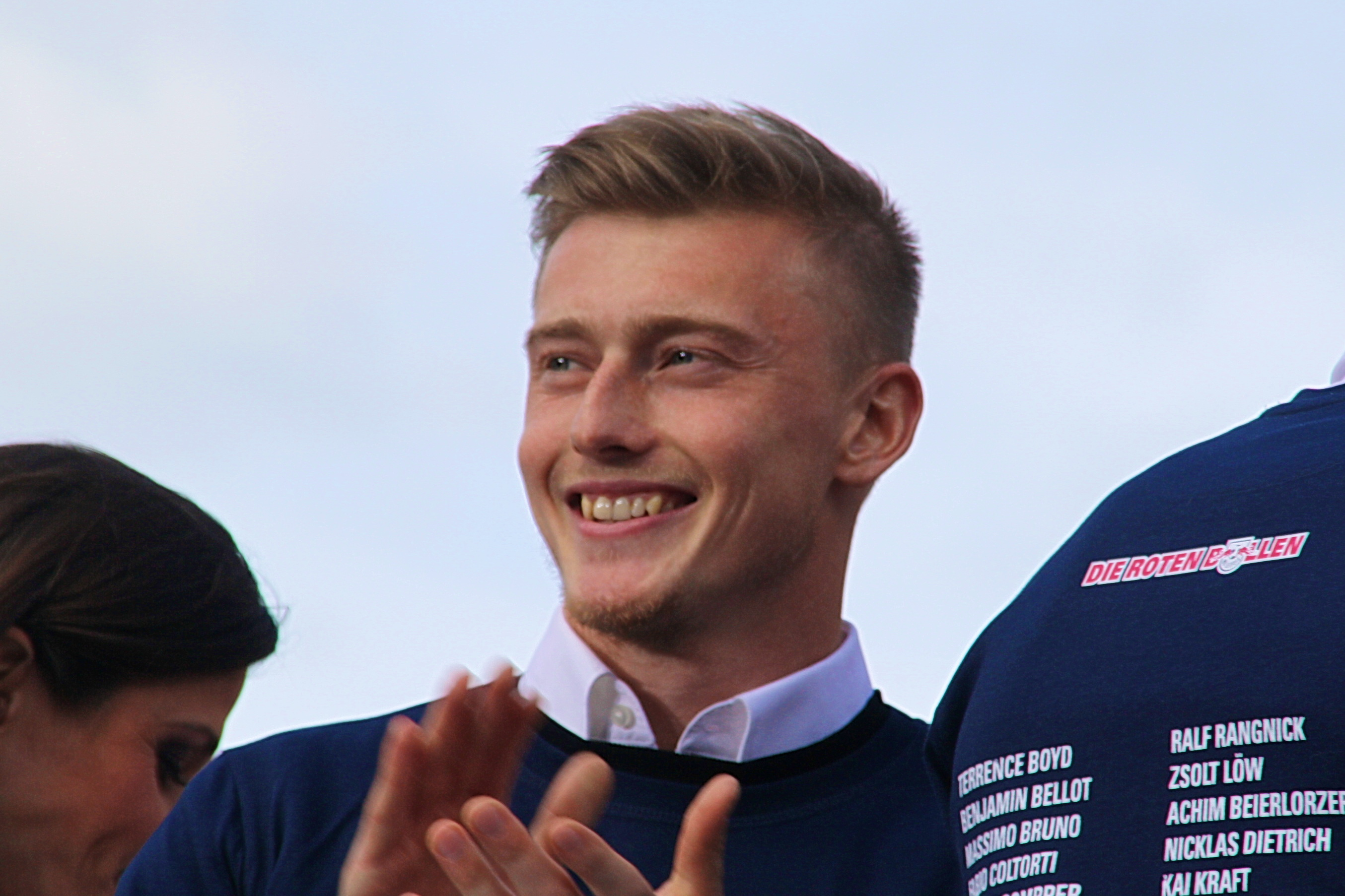 Georg Teigl bei der Aufstiegsfeier RB Leipzig 2016